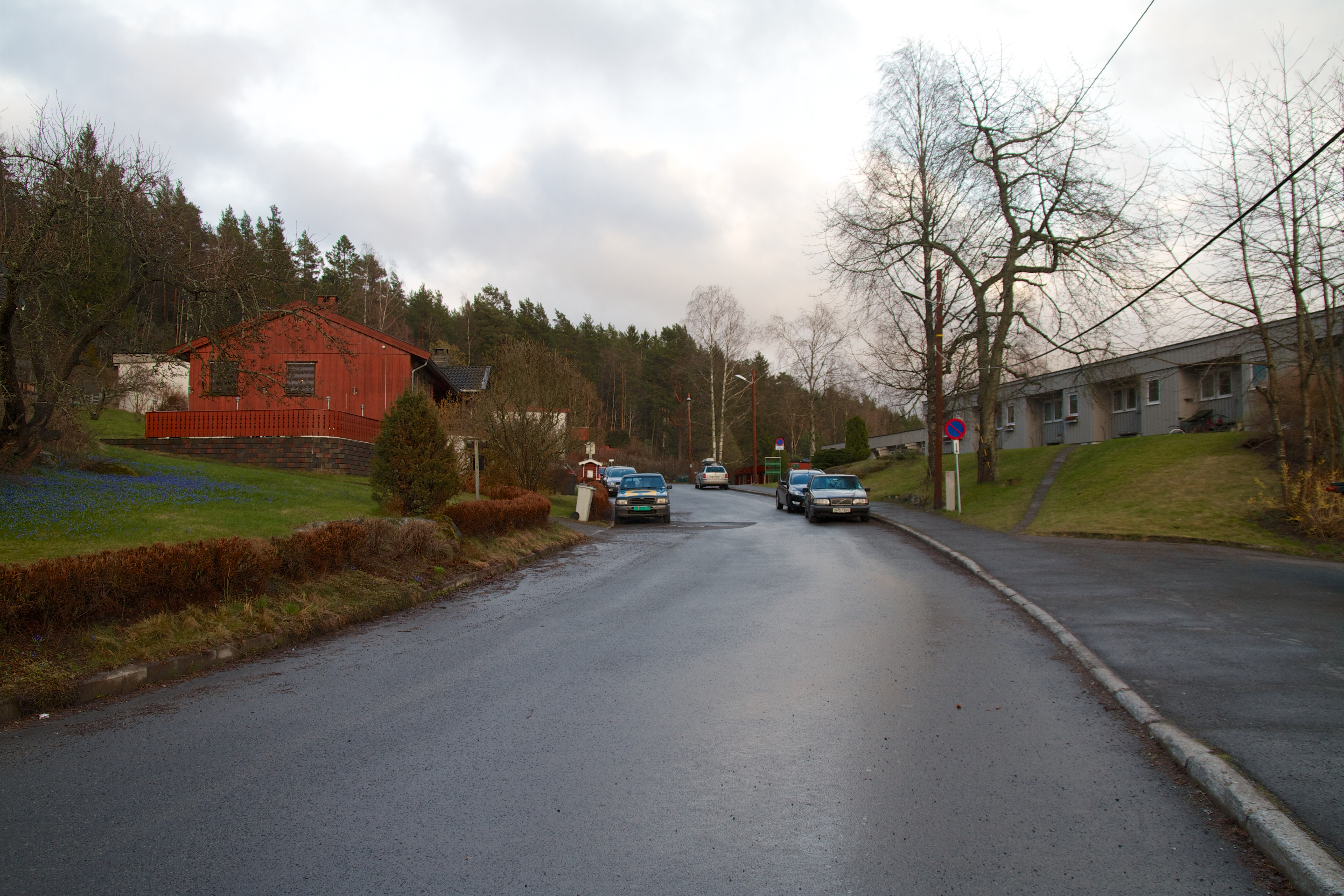 Stallerudveien på Bogerud i Oslo.